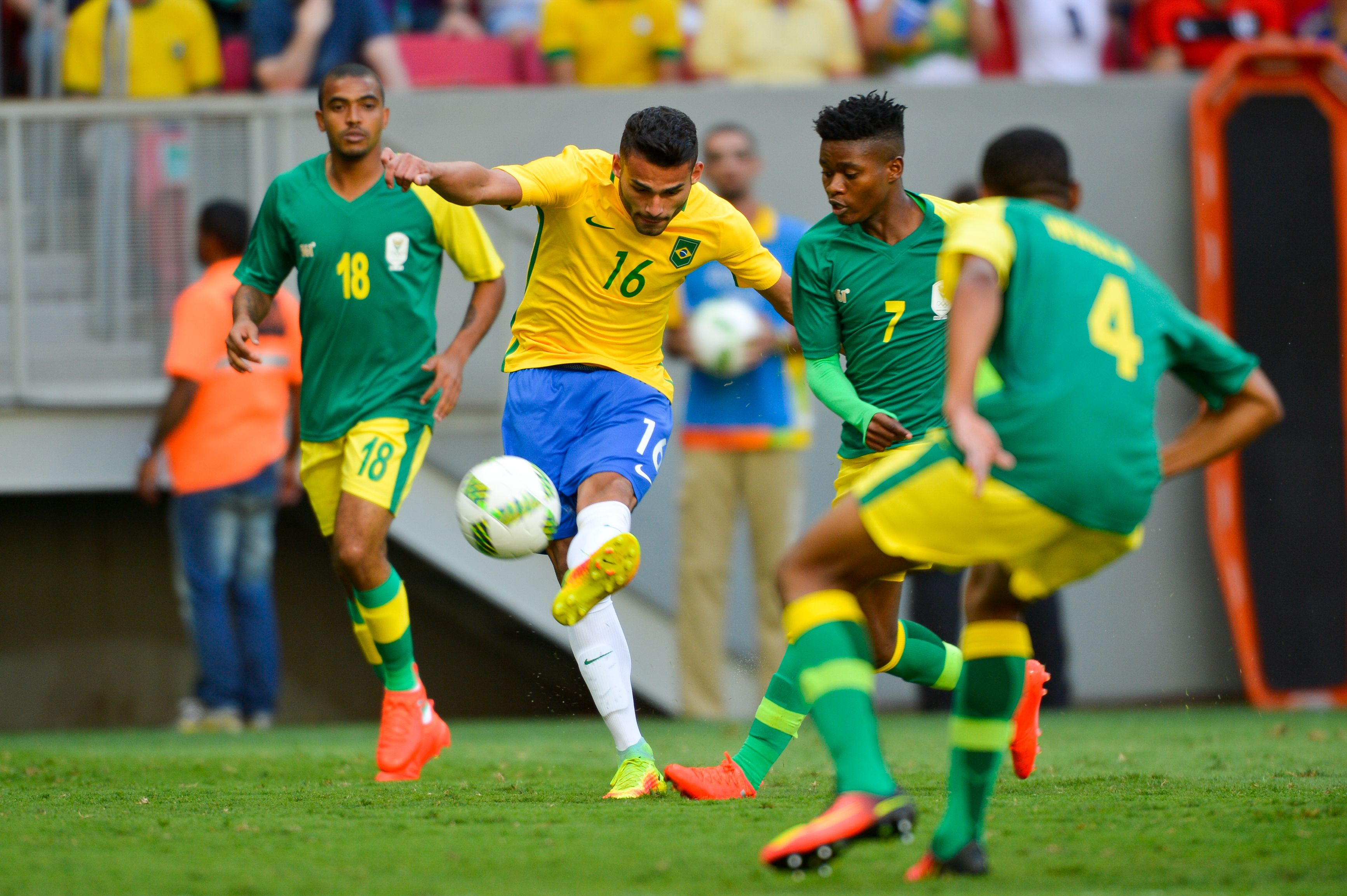 Brasília - Futebol masculino da seleção brasileira, deu o seu pontapé inicial na Olimpíada Rio 2016, em uma partida contra a África do Sul, no Estádio Mané Garrincha (Marcelo Camargo/Agência Brasil)